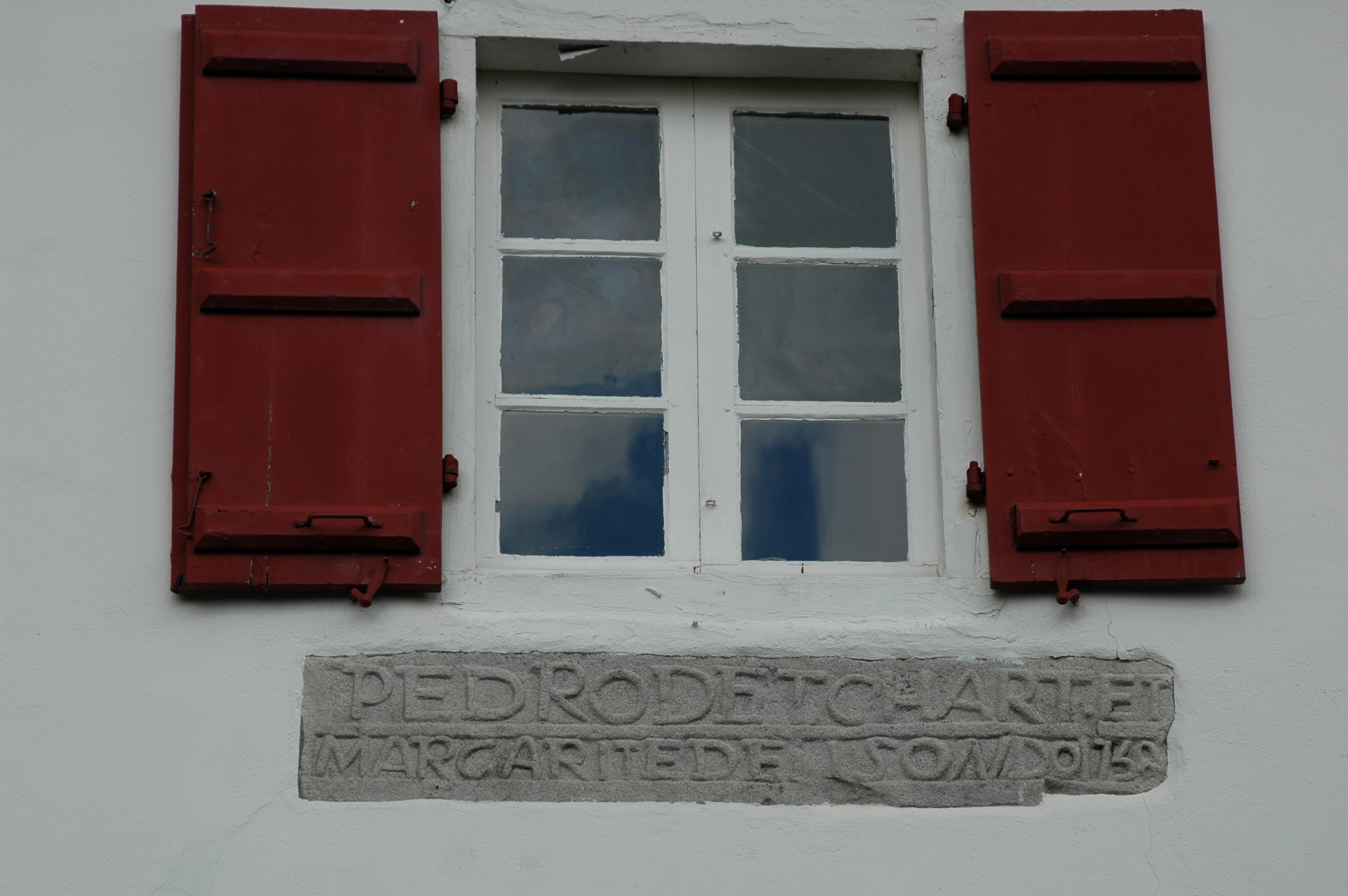 Anhaux - Linteau sculpté